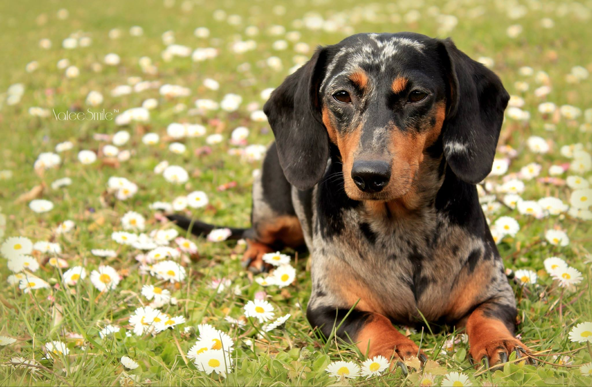 Ne moc známé zbarvení jezevčíků - tygrování. Nesmí se spolu křížit dva jezevčíci tohoto zbarvení, může to vést k vážným zdravotním problémům.